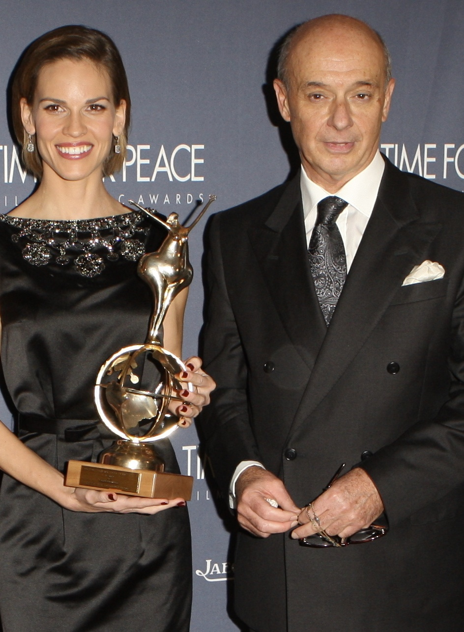 Hilary Swank et Robert Einbeck - Times For Peace